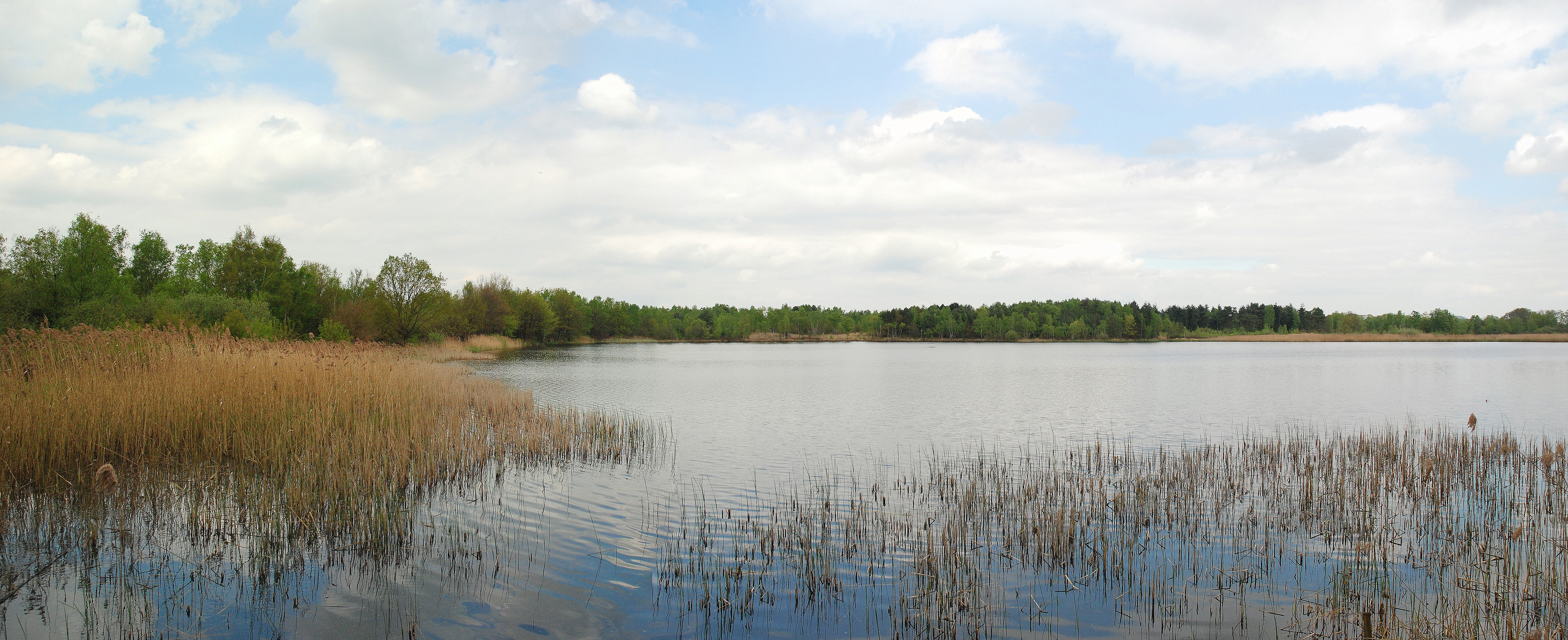 Panoramische foto van de Maten, natuurgebied in Genk, België